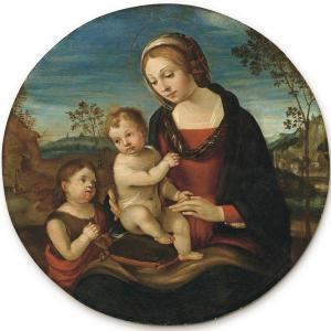 Vincenzo Rustici (1556 - 1632) - Madonna col Bambino e San Giovannino